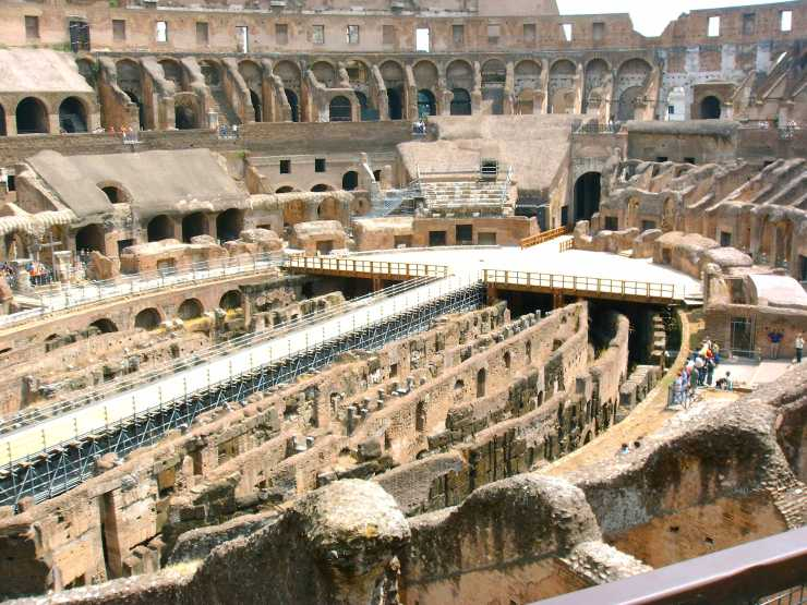 Zelfgemaakte foto